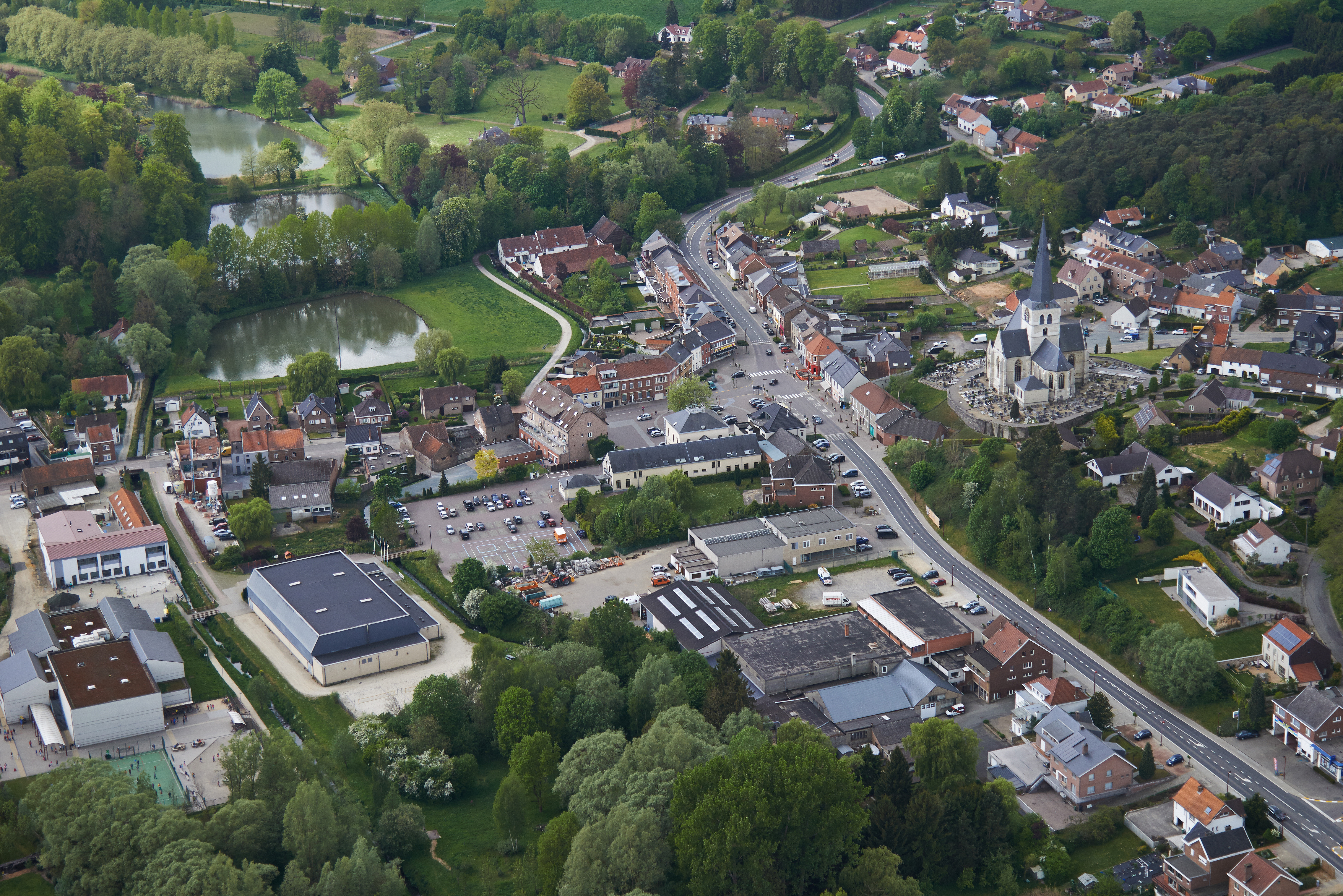 Luchtfoto van het centrum van Huldenberg, België. Rechts de Onze-Lieve-Vrouwekerk